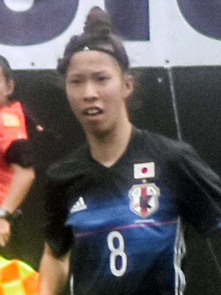 From Flickr user edrost88, match details here